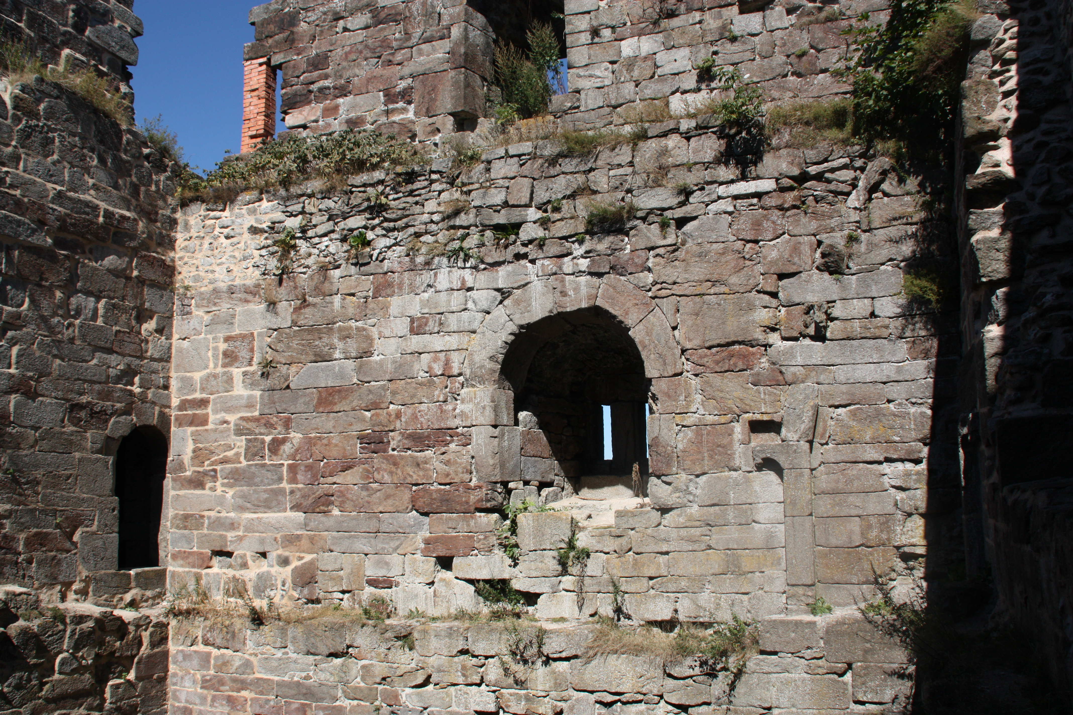 Burg Přimda, Westböhmen, Tschechische Republik. Nordwand im 1. Obergeschoss mit Durchgang zum Risalit, Fenster und Kaminrest.